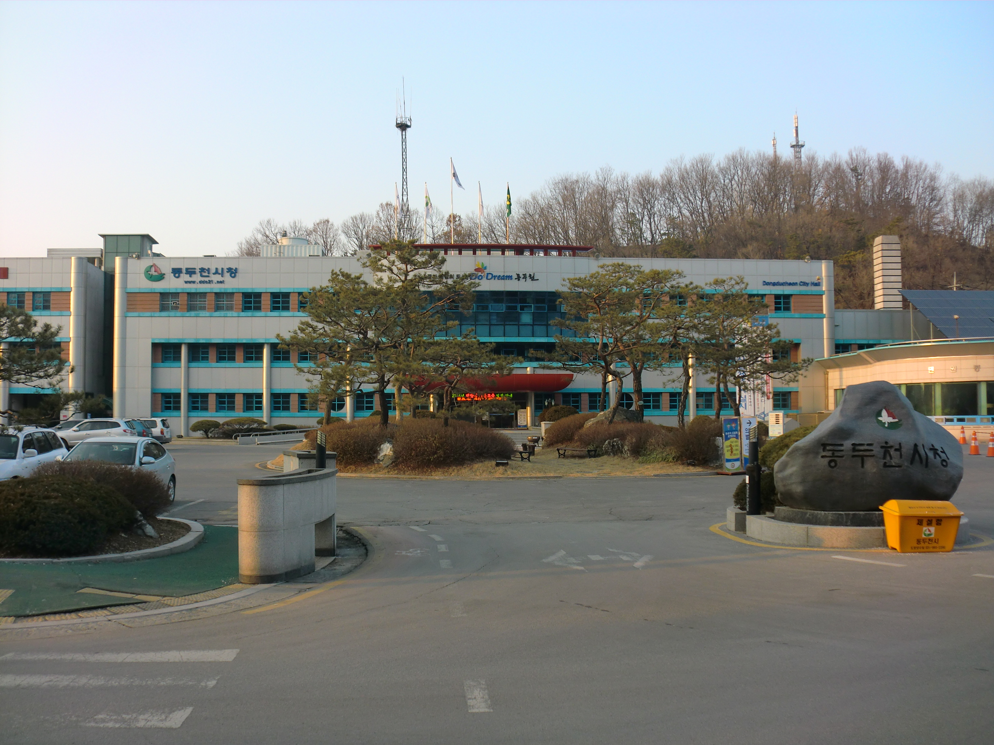 경기도 동두천시에 있는 동두천시청